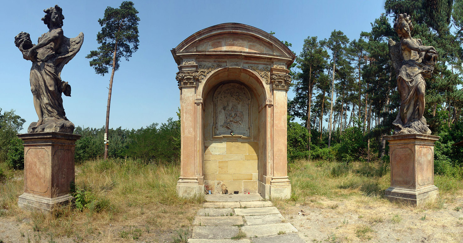 Kaplička sv. Václava, též známá jako eremitáž u sv. Václava, je pozůstatkem původní poustevny na panství.